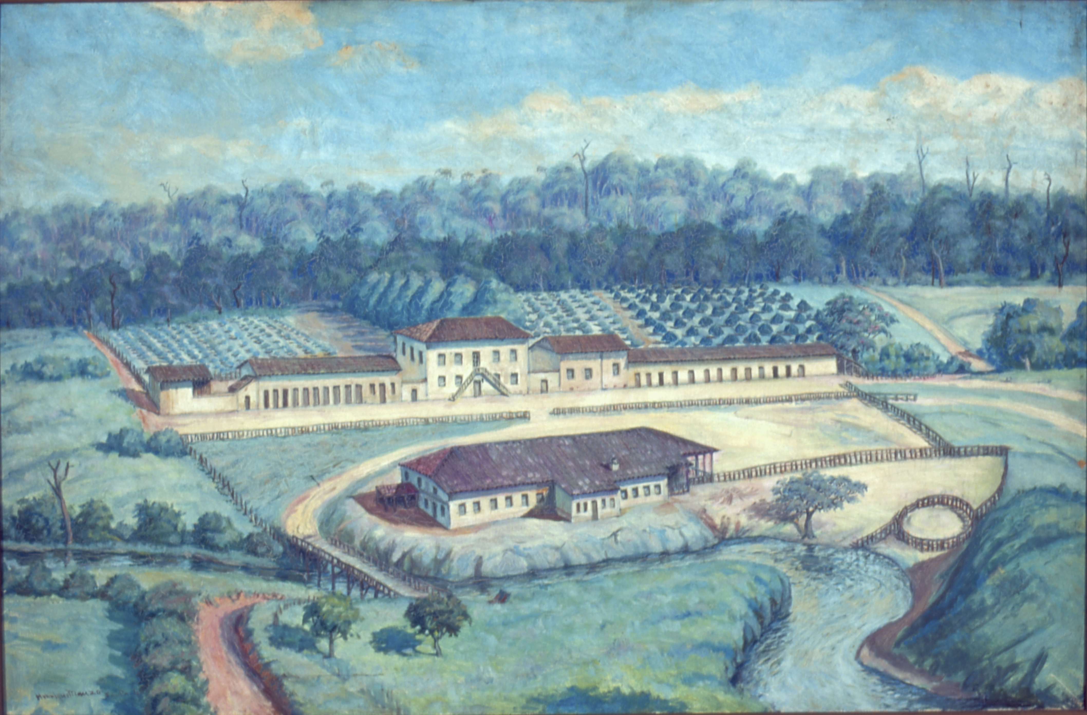 Obra que integra o acervo do Museu Paulista da USP. Coleção Fundo Museu Paulista - FMP